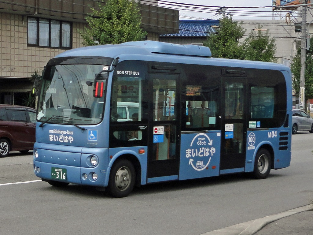 まいどはやバス清水町ルート車両（まちづくりとやま）